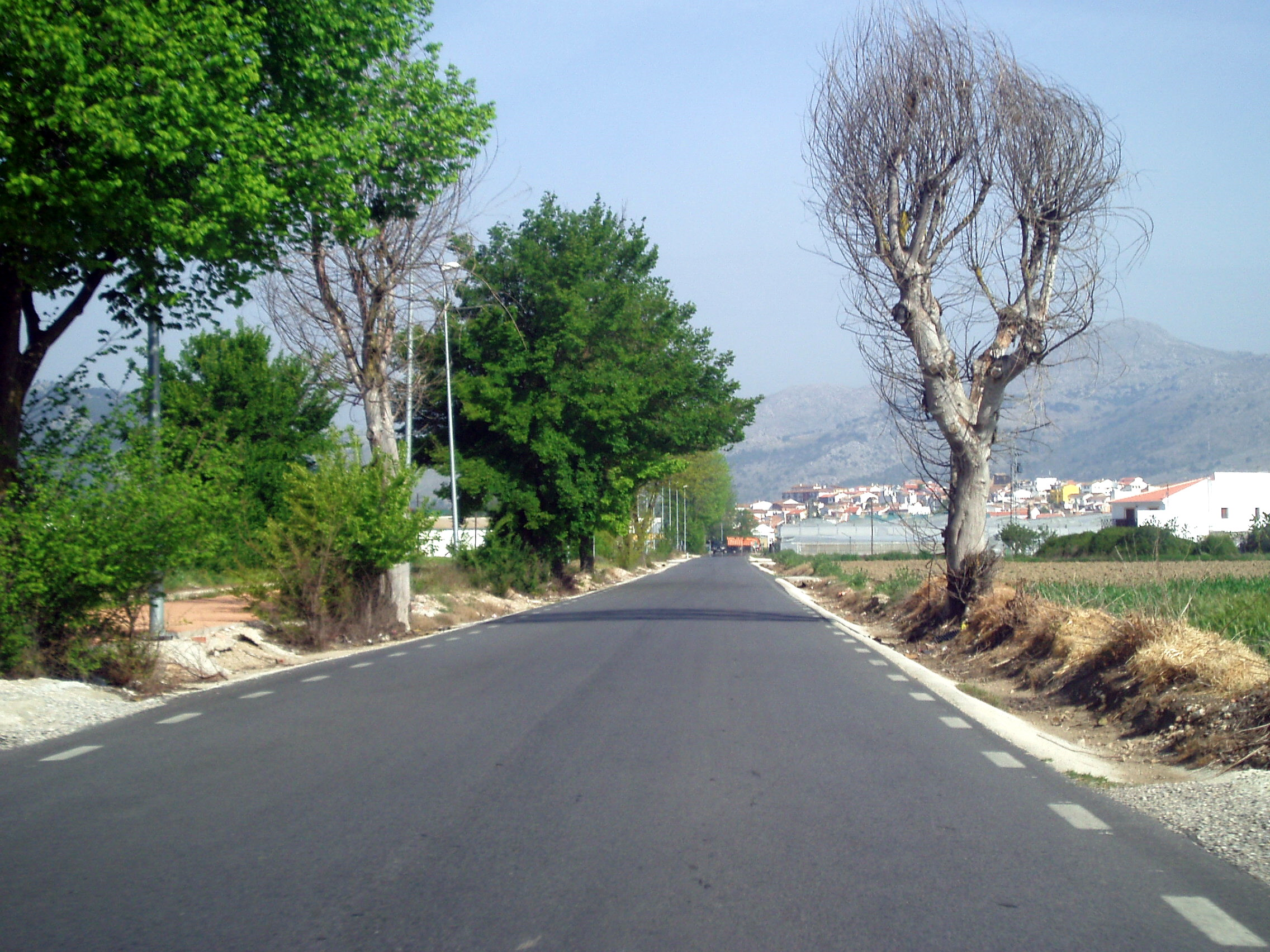 Ventas de Zafarraya, en el municipio de Alhama de Granada (Granada, España)